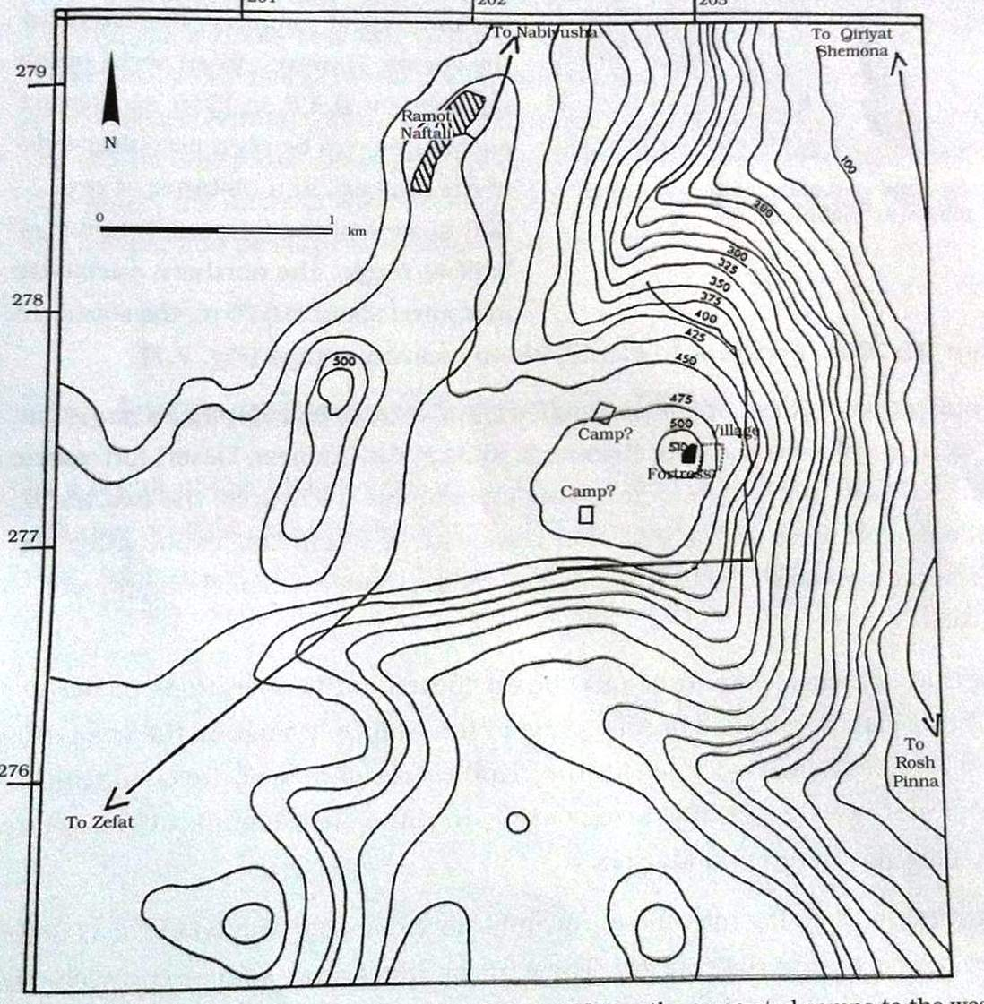 מצודת קרן נפתלי-מערכת המצור